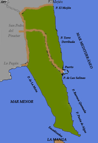 Plano de la pedanía de Las Salinas en San Pedro del Pinatar.